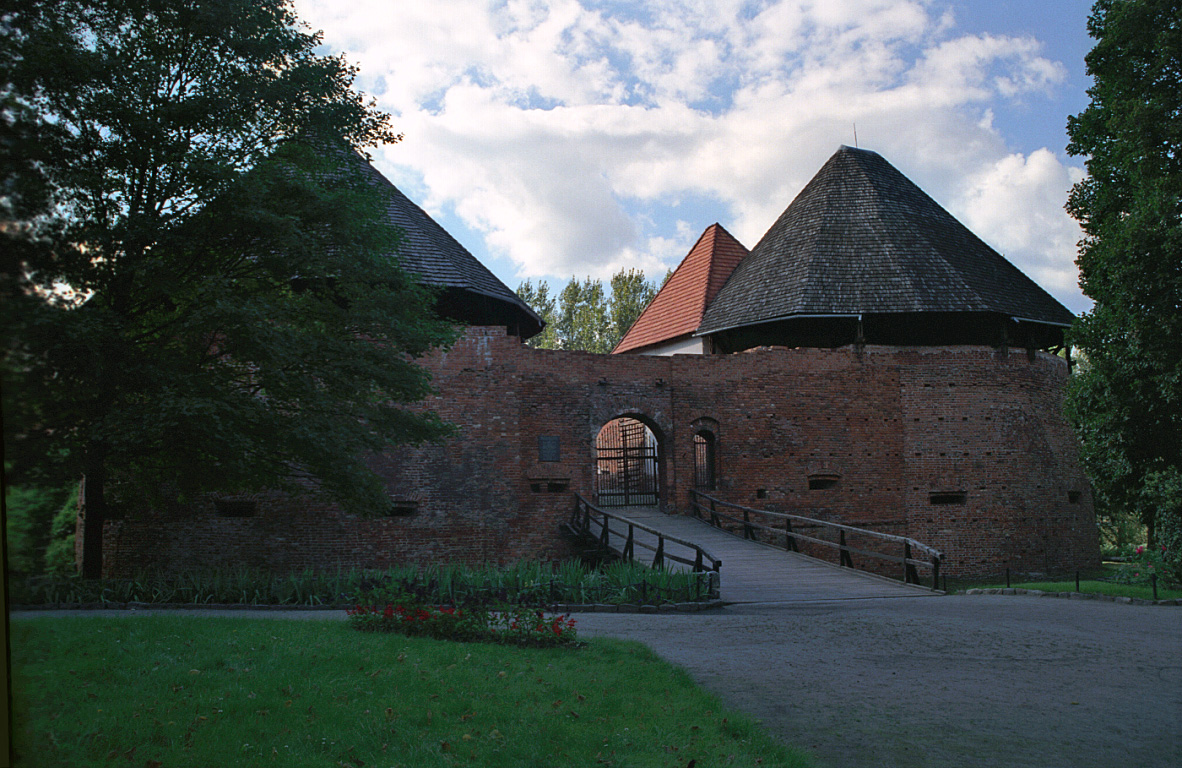 Międzyrzecz